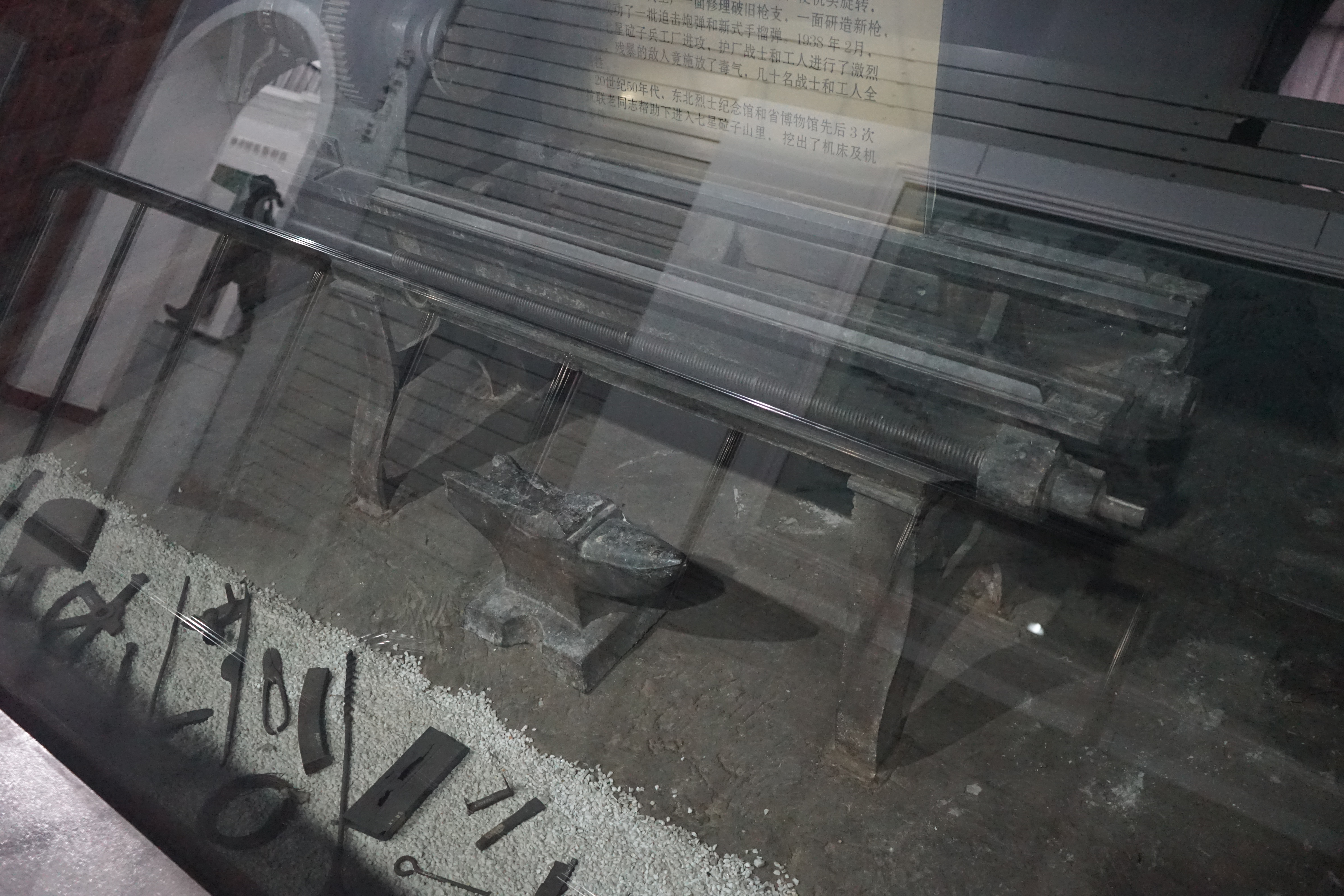 1936年秋，东北抗联在七星砬子设立兵工厂。机床是独立师通过地方抗日组织购买。1938年2月兵工厂全体成员死于日军进攻。机床及零件是20世纪50年代东北烈士纪念馆在七星砬子山挖掘出的。